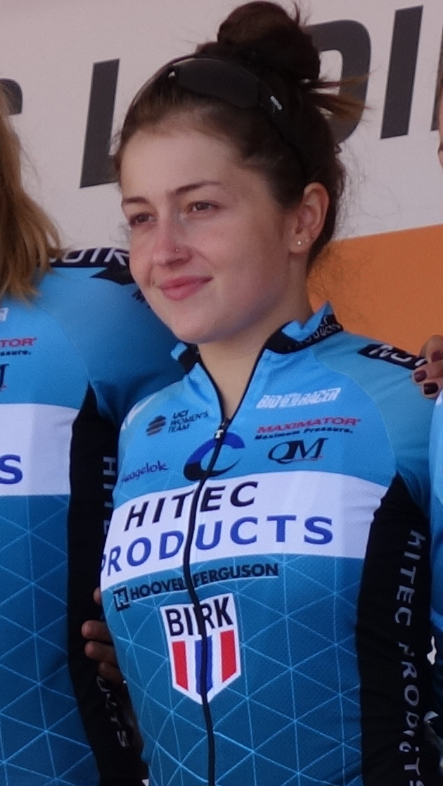 Grace Garner (Hitec) bij de start van de eerste etappe van Stramproy naar Weert in de Boels Ladies Tour 2019